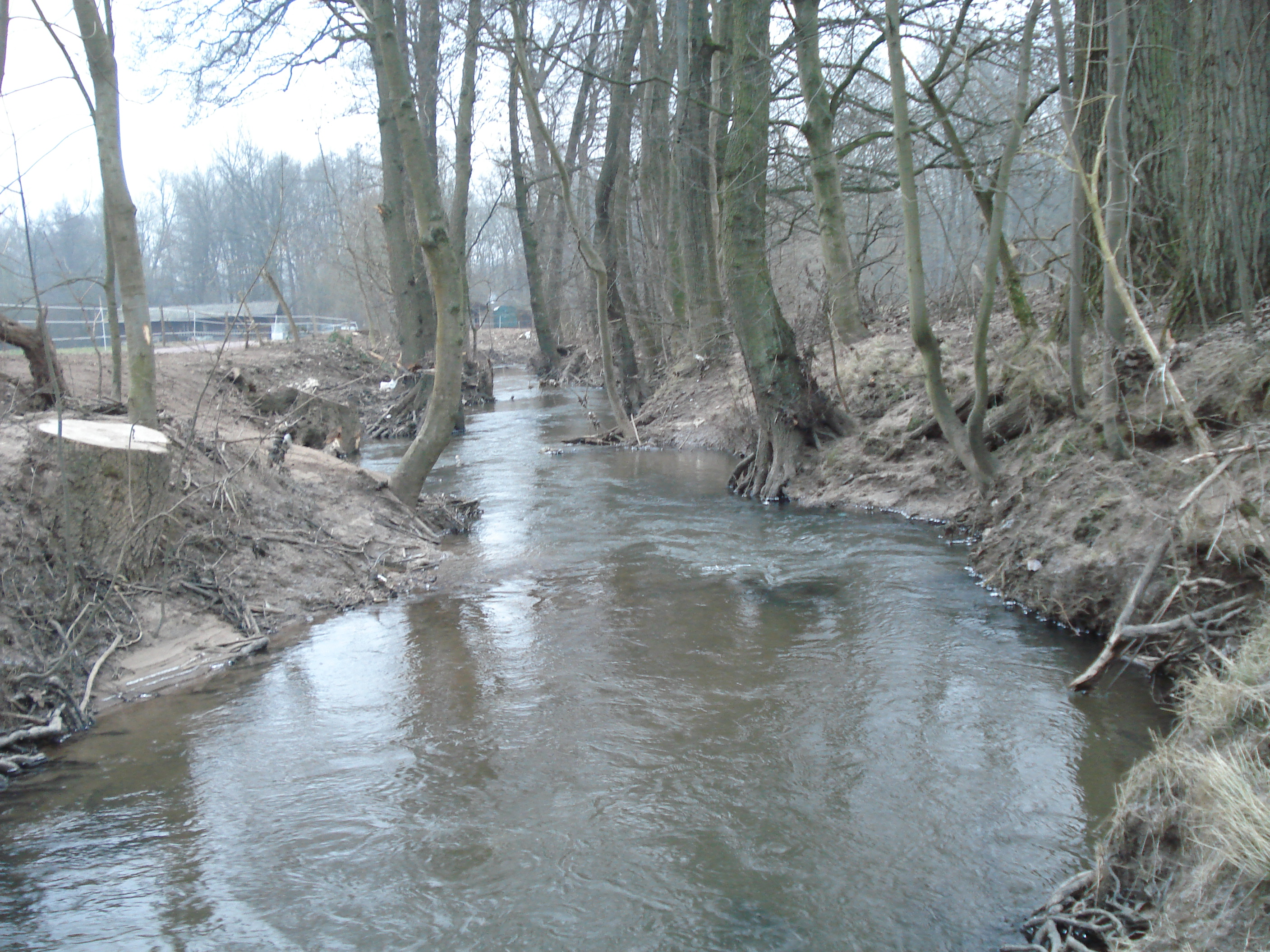 Die Laufach kurz vor ihrer Mündung